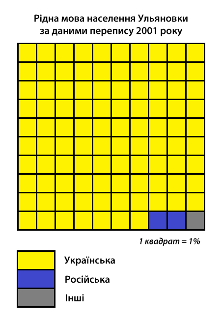 Інфографіка розподілу населення міста Ульяновка за рідною мовою згідно з даними перепису 2001 року. Джерело: Розподіл населення Кіровоградської області за рідною мовою (у % до загальної чисельності населення) за переписом 2001 року